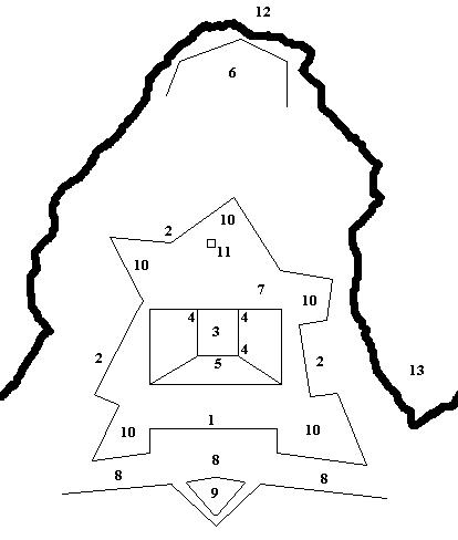 Zamek San Pedro de la Roca na Kubie